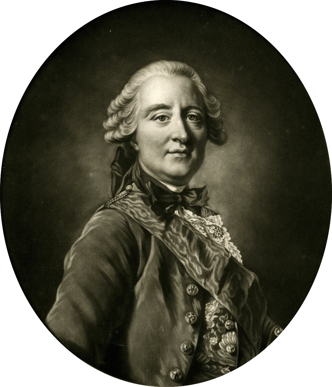 Claude Louis François Régnier de Guerchy (1715 – 1767), French diplomat and soldier.